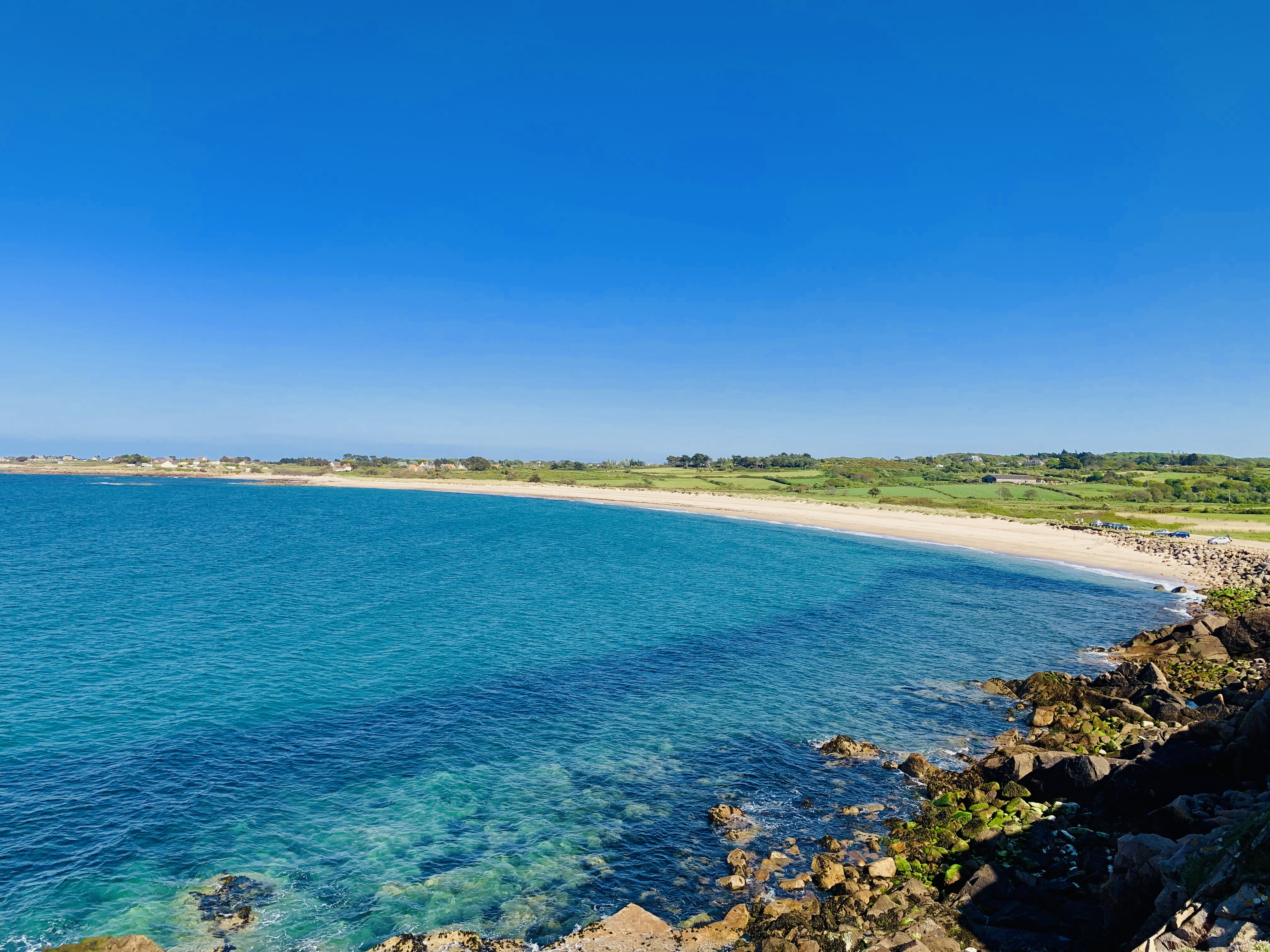 Anse et plage de la Mondrée, à Fermanville, Normandie.